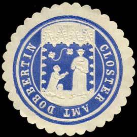 Sealing stamp Title: Closter Amt Dobbertin Description: Kloster, blau, weiß, geprägt Place: Dobbertin size: 4 cm